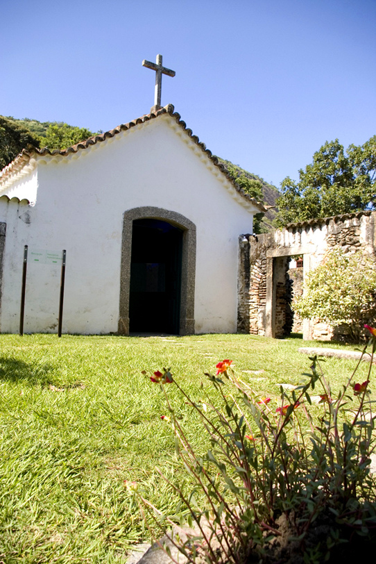 Endereço: Praça de Itaipu, S/Nº – Itaipu – Niterói- RJ. Tel: (21) 3701-2994 Horários: Terça a sexta, das 10h às 17h. Sábados, domingos e feriados, das 13h às 17h Foto: Divulgação IBRAM migre.me/cJCxT